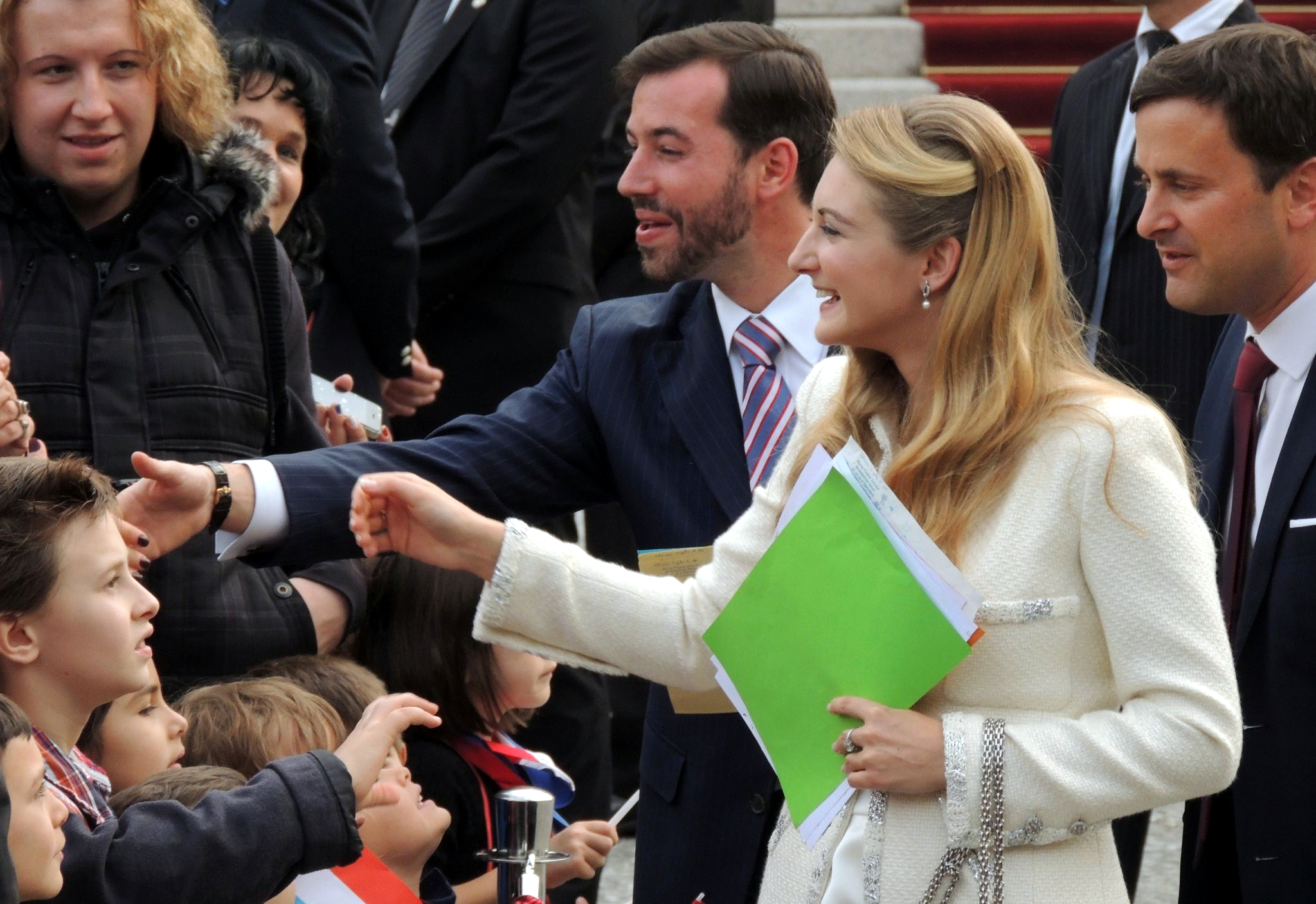 Den Ierfgroussherzog Guillaume an d'Stéphanie vu Lëtzebuerg no hirem zivile Bestietnes.